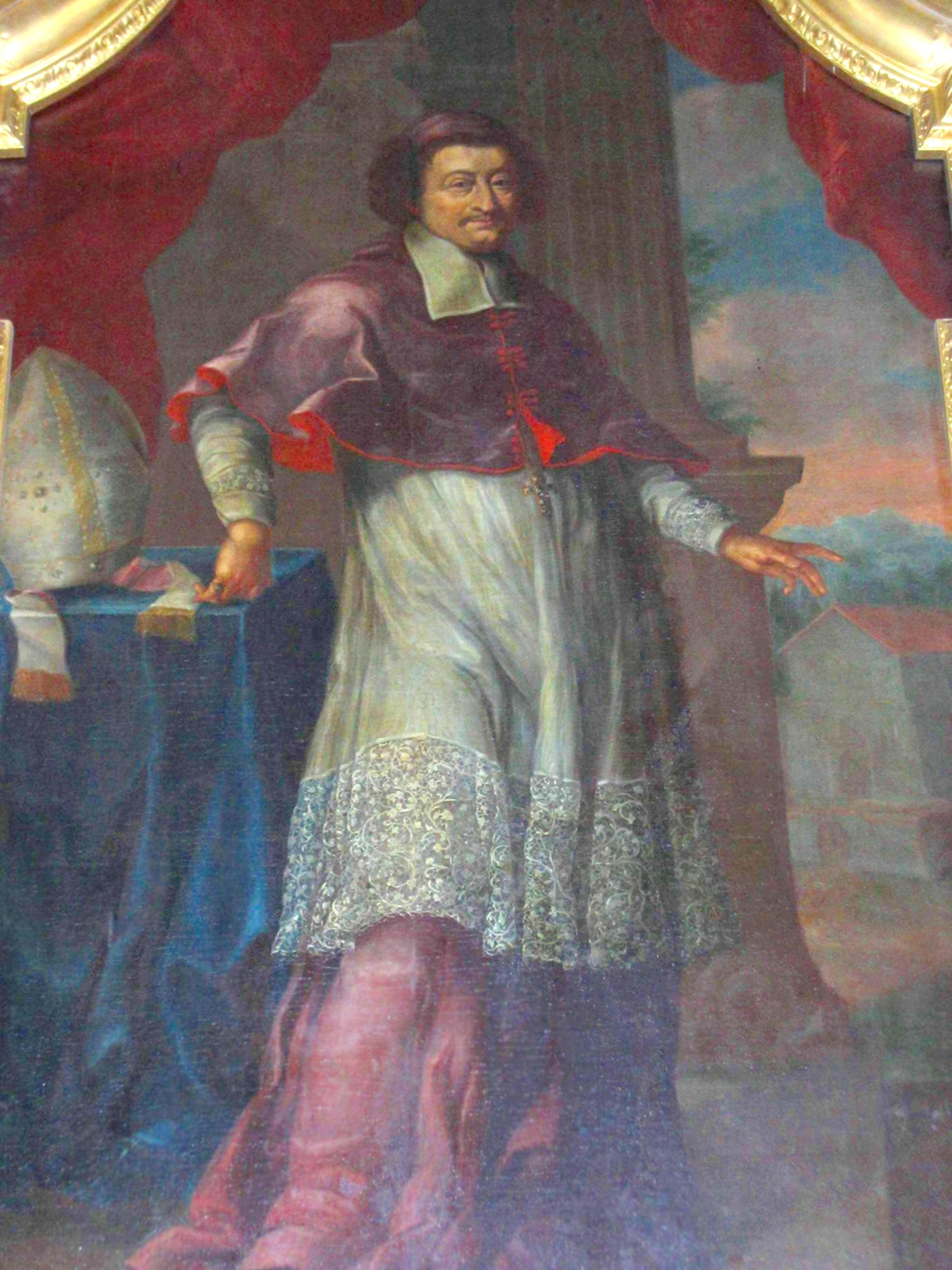 Jan Małachowski Bishop of Kraków, anonymous portrait of XVII century image taken by user:Mathiasrex Maciej Szczepańczyk